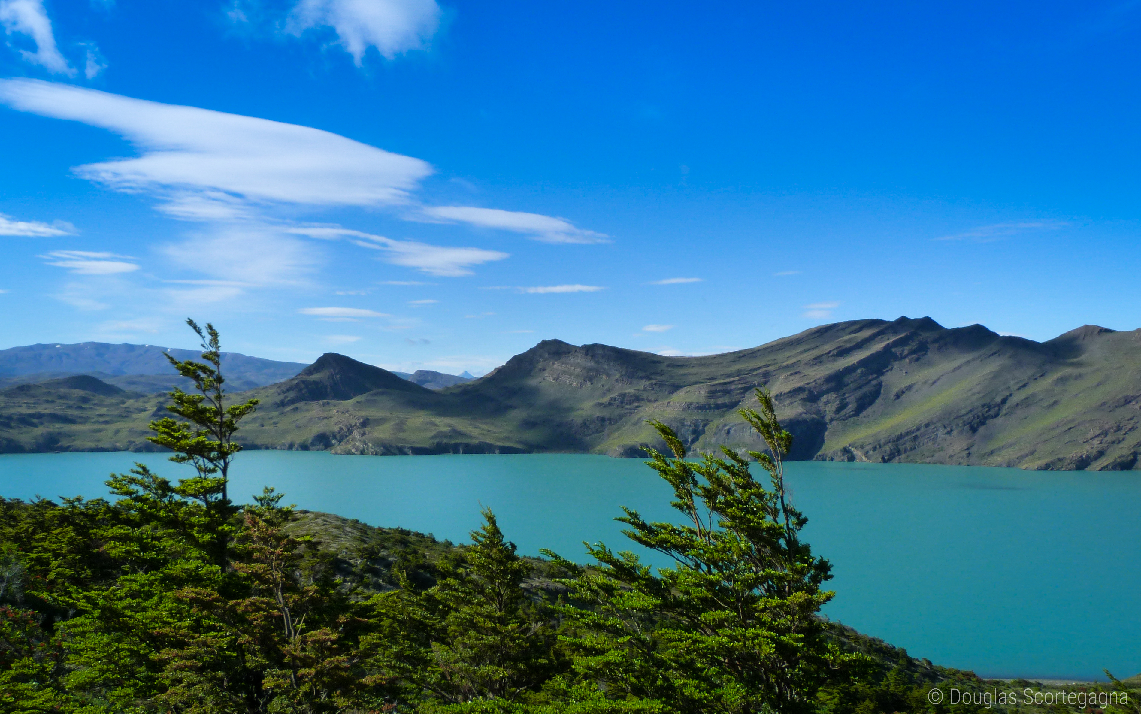 Sinclino al lado del Lago Nordenskiöld (Nordensjöld), Torres del Paine, Chile.